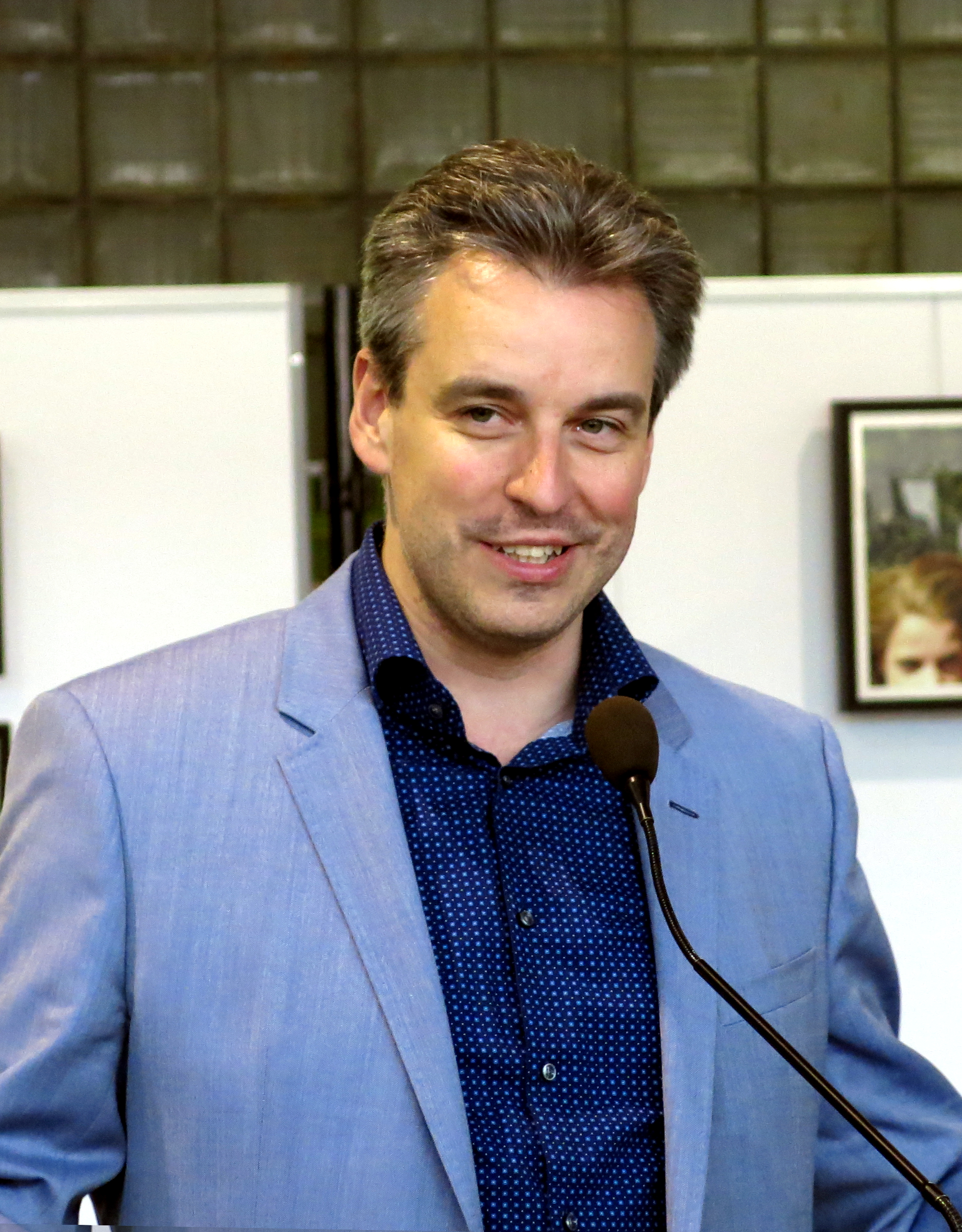 De Minister Claude Meisch hält eng Ried beim Vernissage vu "Jukowo Jugendkonschtwoch 2014", am 1535°C zu Déifferdeng.